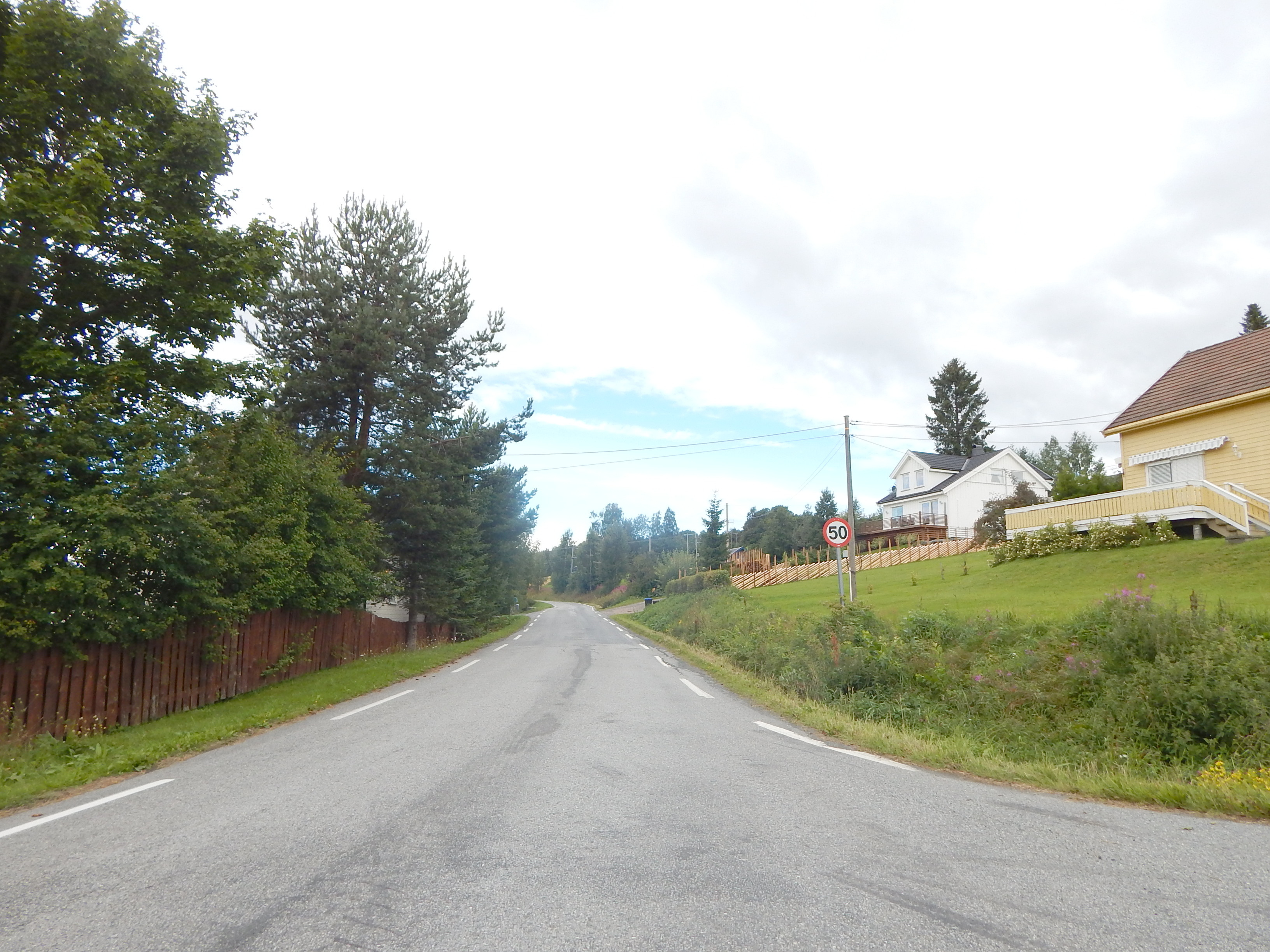 Fylkesvei 2412 (Åslendevegen) sett fra fylkesvei 2410